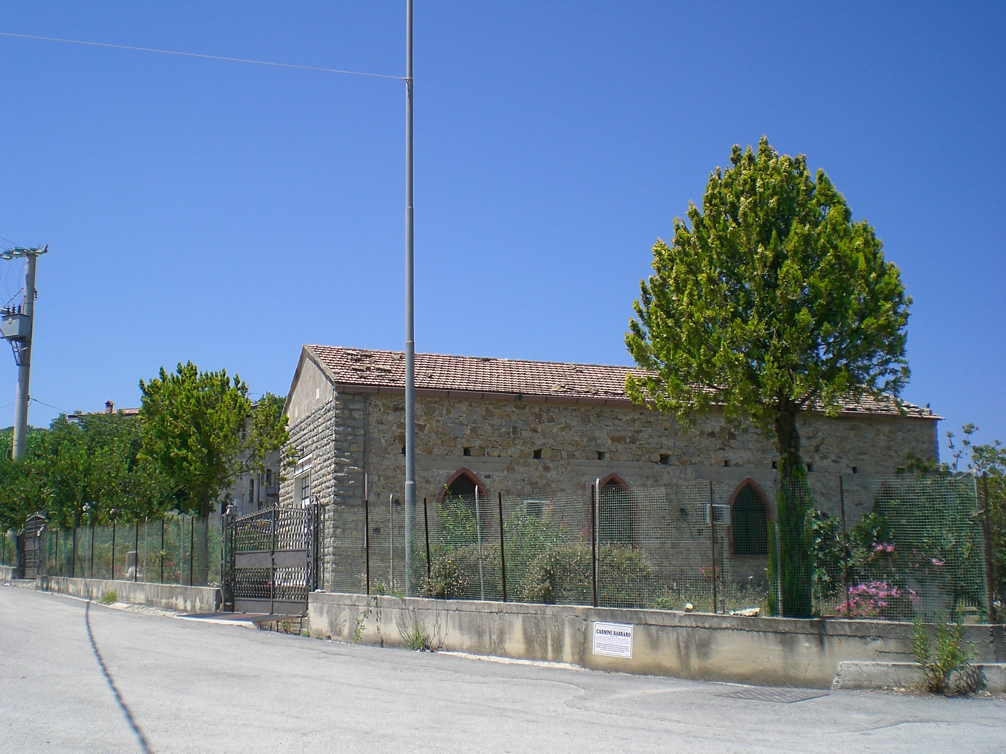 La Chiesa Evangelica Pentecostale "Assemblee di Dio in Italia" di Castelcivita